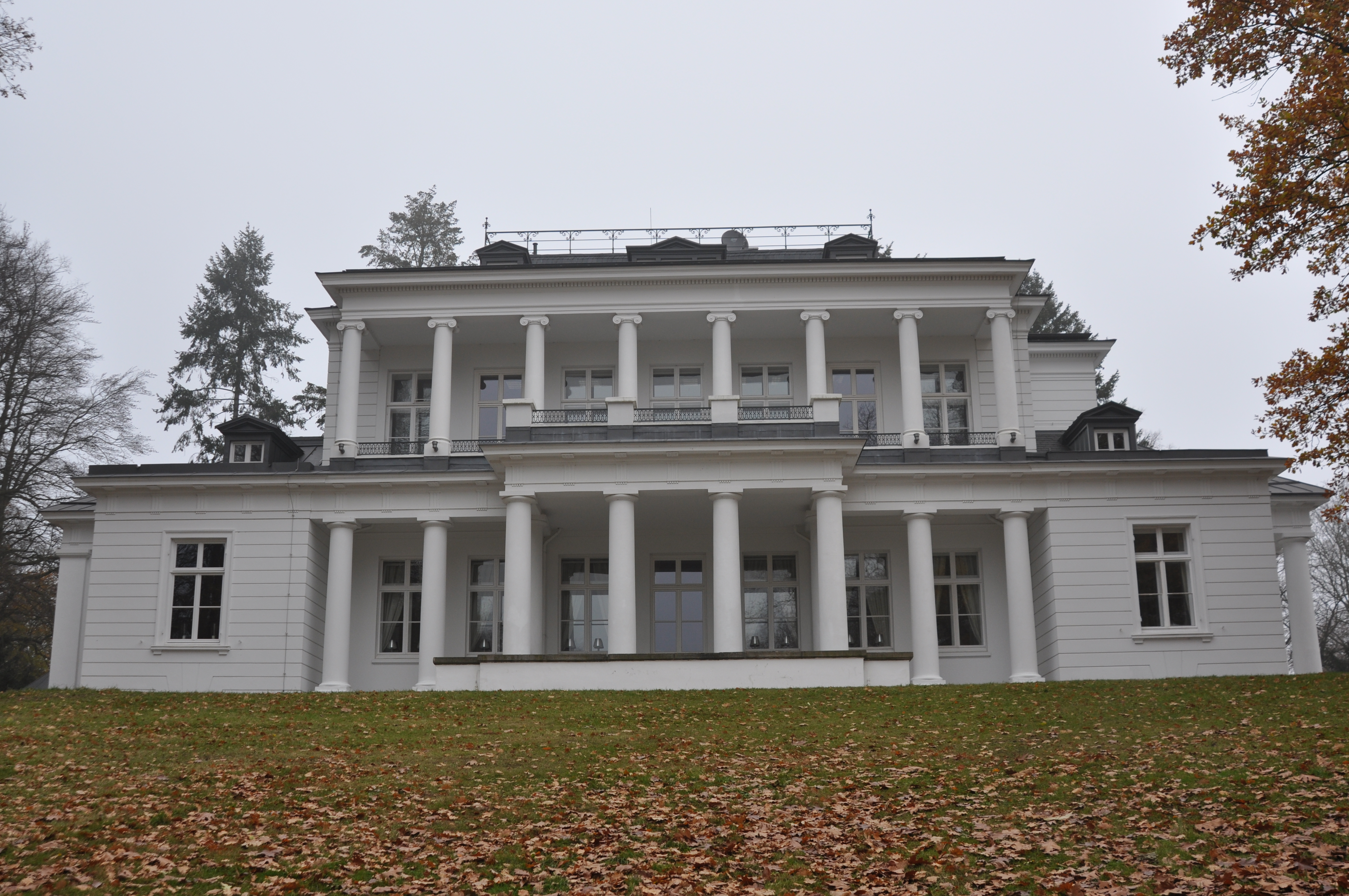 Südansicht des Goßlerhauses im Goßlerpark This is a photograph of an architectural monument.